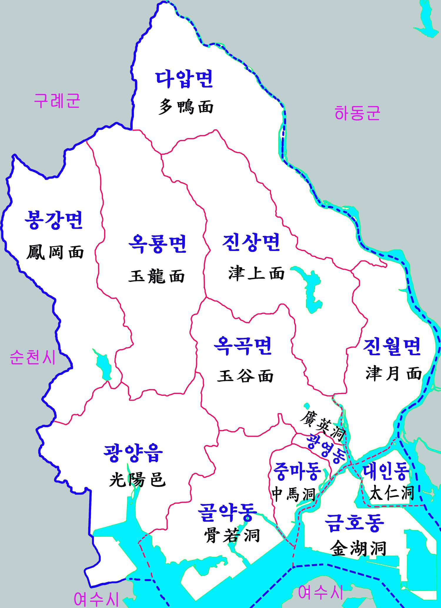 광양시 행정구역도